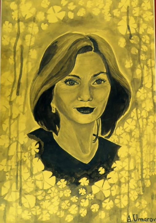 Portrait posthume de Natalia Estemirova, militante des droits de l'homme russe, réalisé par le peintre tchétchène Asia Oumarova.